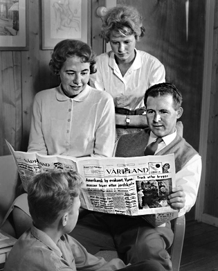 bolig, interiør, stue, salong, mann, kvinne, jente, gutt, avislesning, Vårt Land.